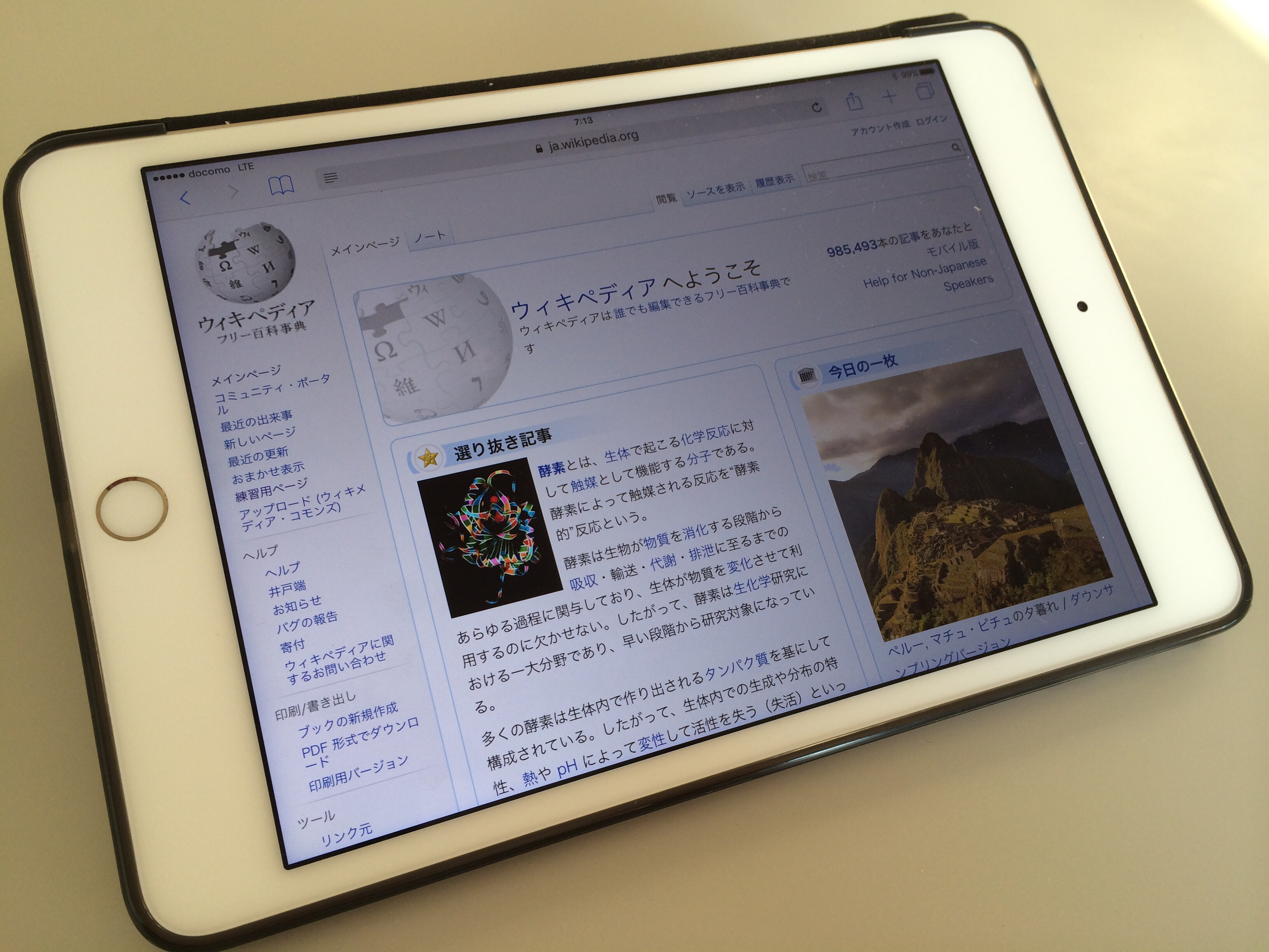 iPad mini4 カバーを付けた状態。